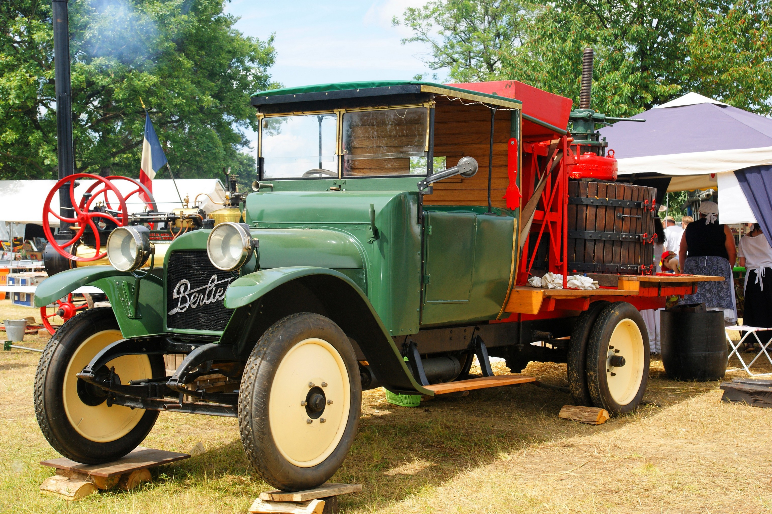 Une camionnette avec un pressoir vue à la Locomotion en fête